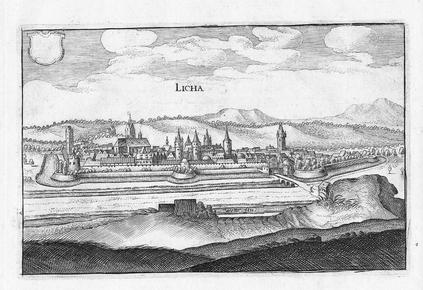 Licha - Auszug aus der Topographia Hassiae, Kupferstich, 20 x 16 cm